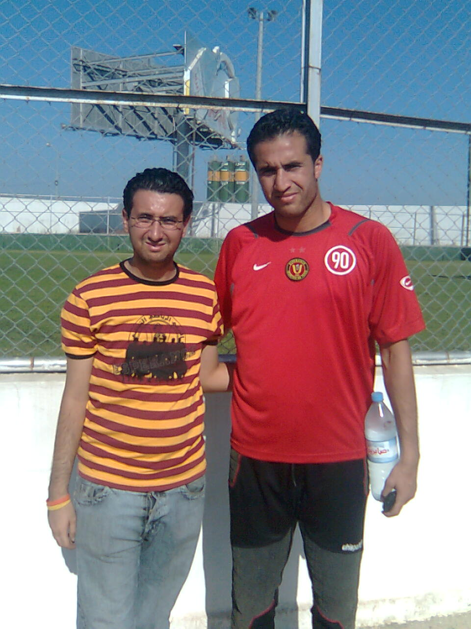 Hamdi Kasraoui sous le maillot de l'Espérance sportive de Tunis